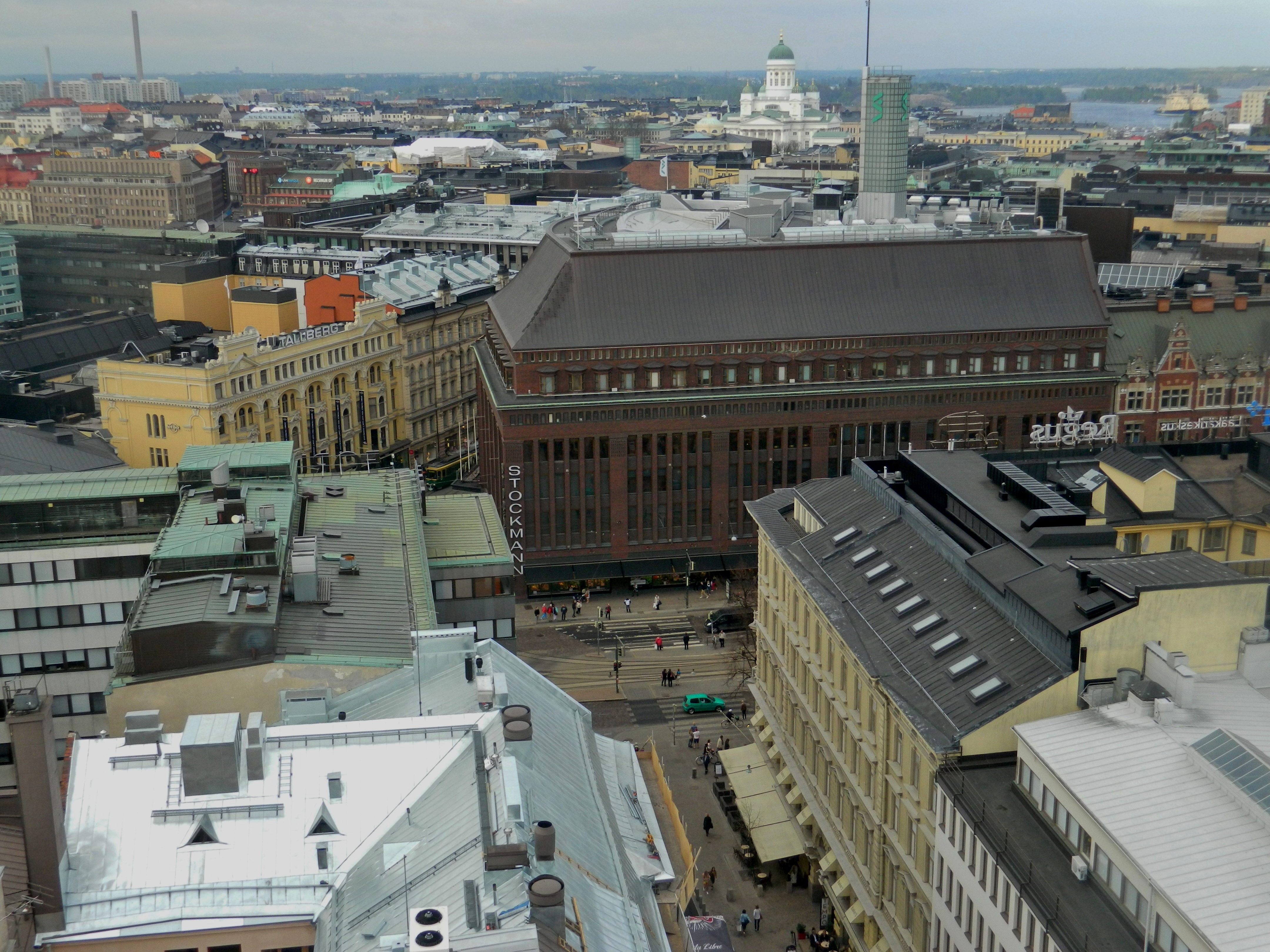 Helsingin siluettia. Taustalla Stockmannin tavaratalo